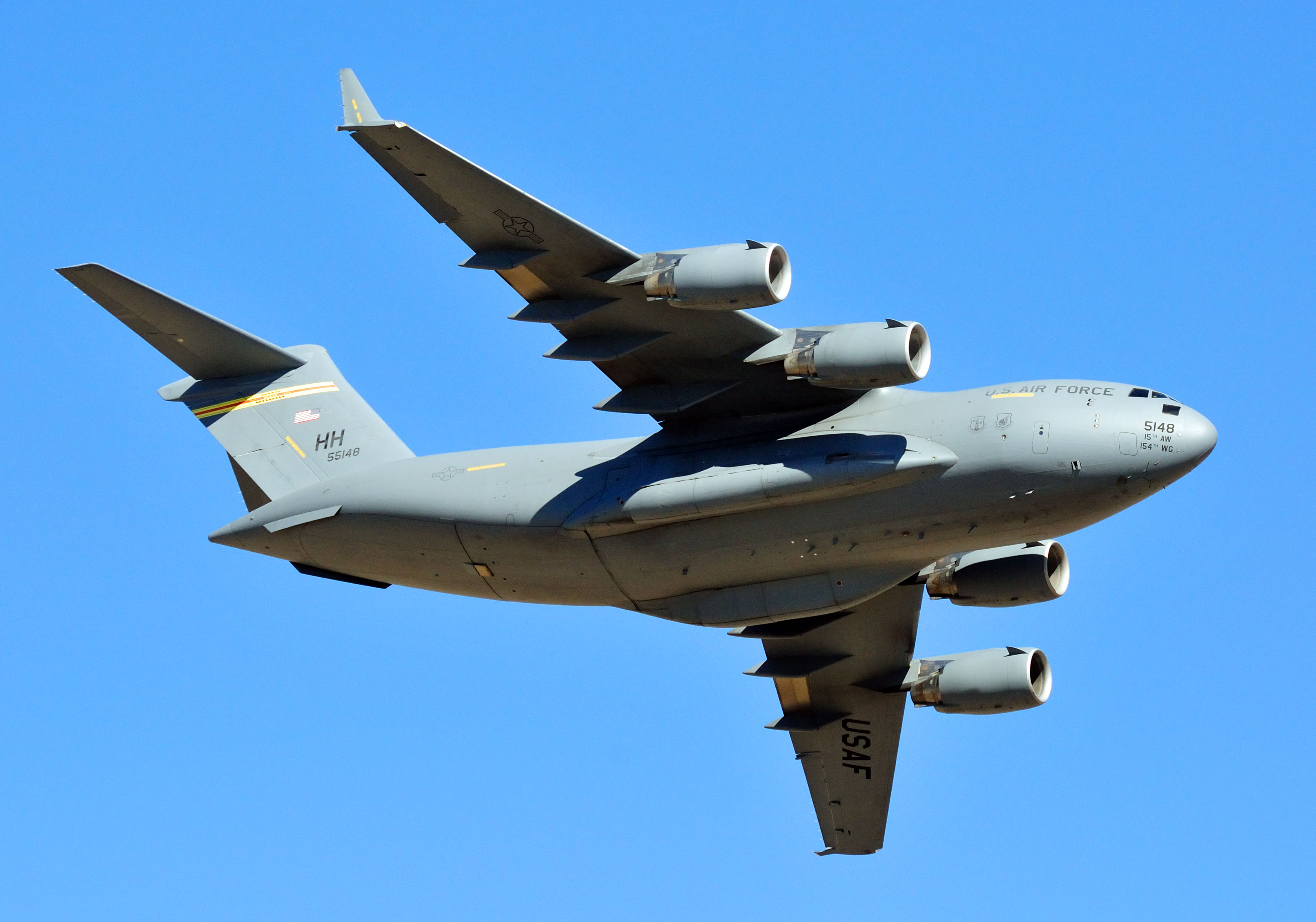 Reno Air Races 2009